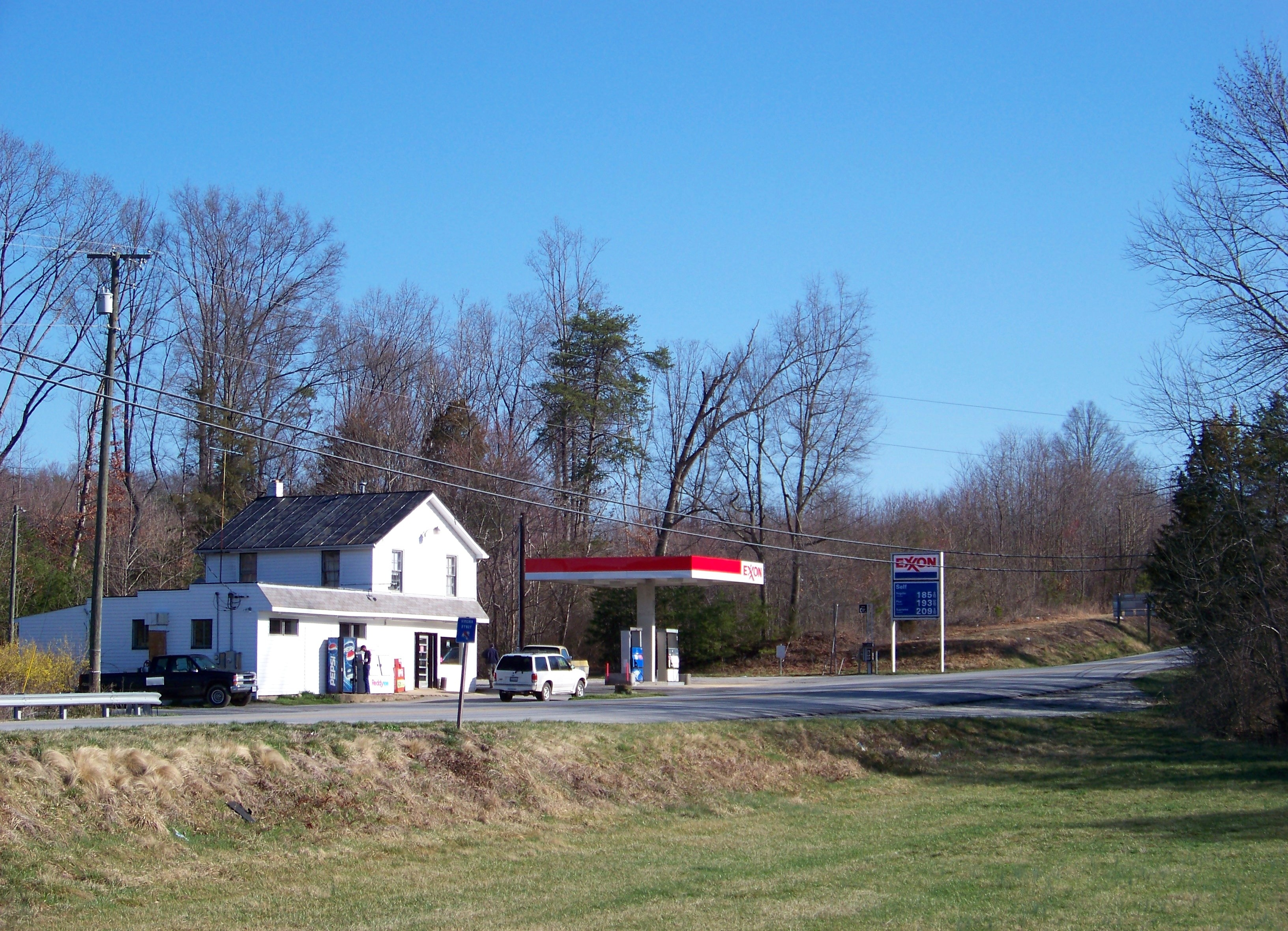 Massies Mill, VA, USA